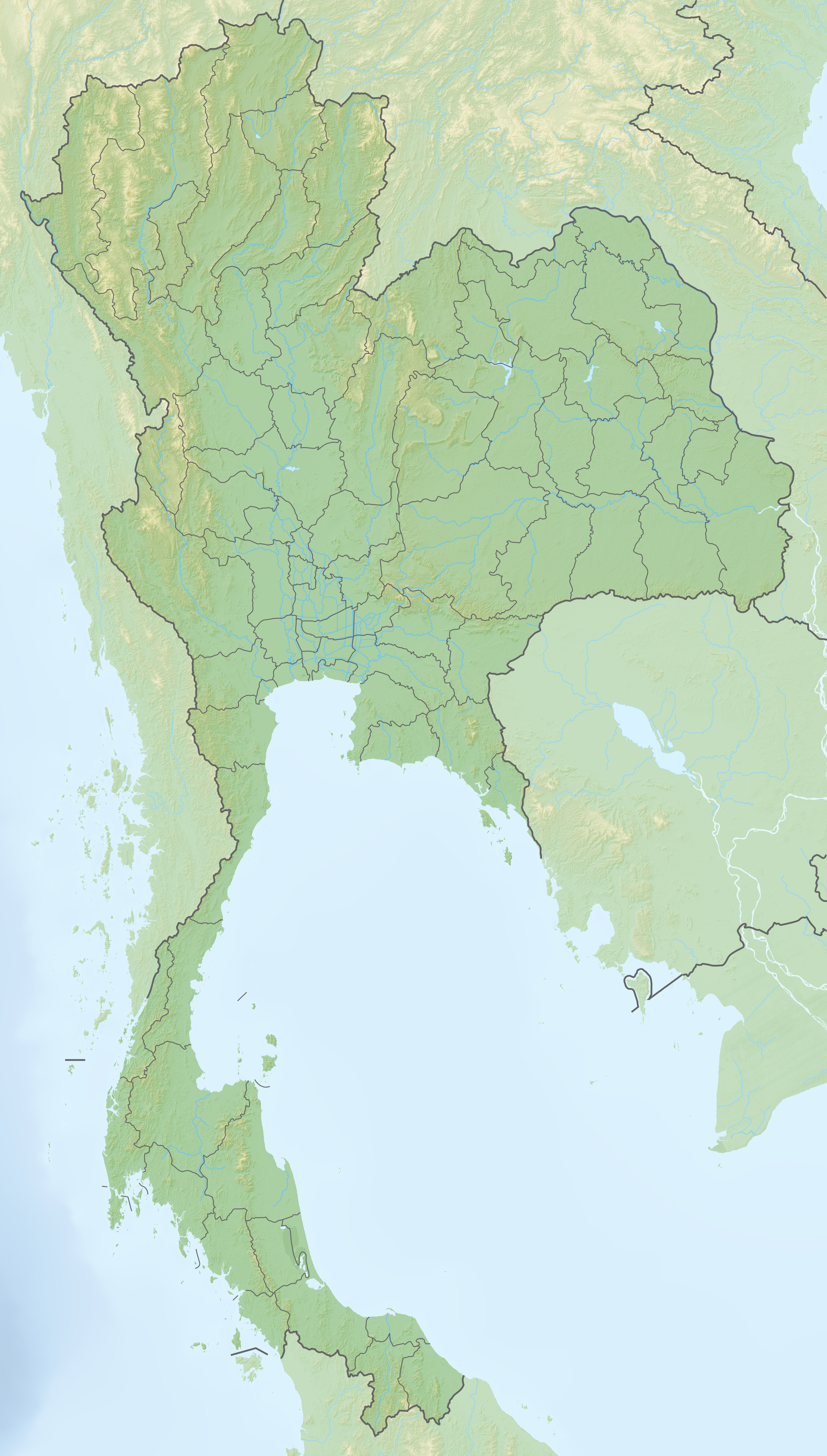 Reliefkarte Thailand Topographischer Hintergrund: NASA Shuttle Radar Topography Mission (public domain). SRTM3 v.2. Grenzen: Thailand adm location map.svg